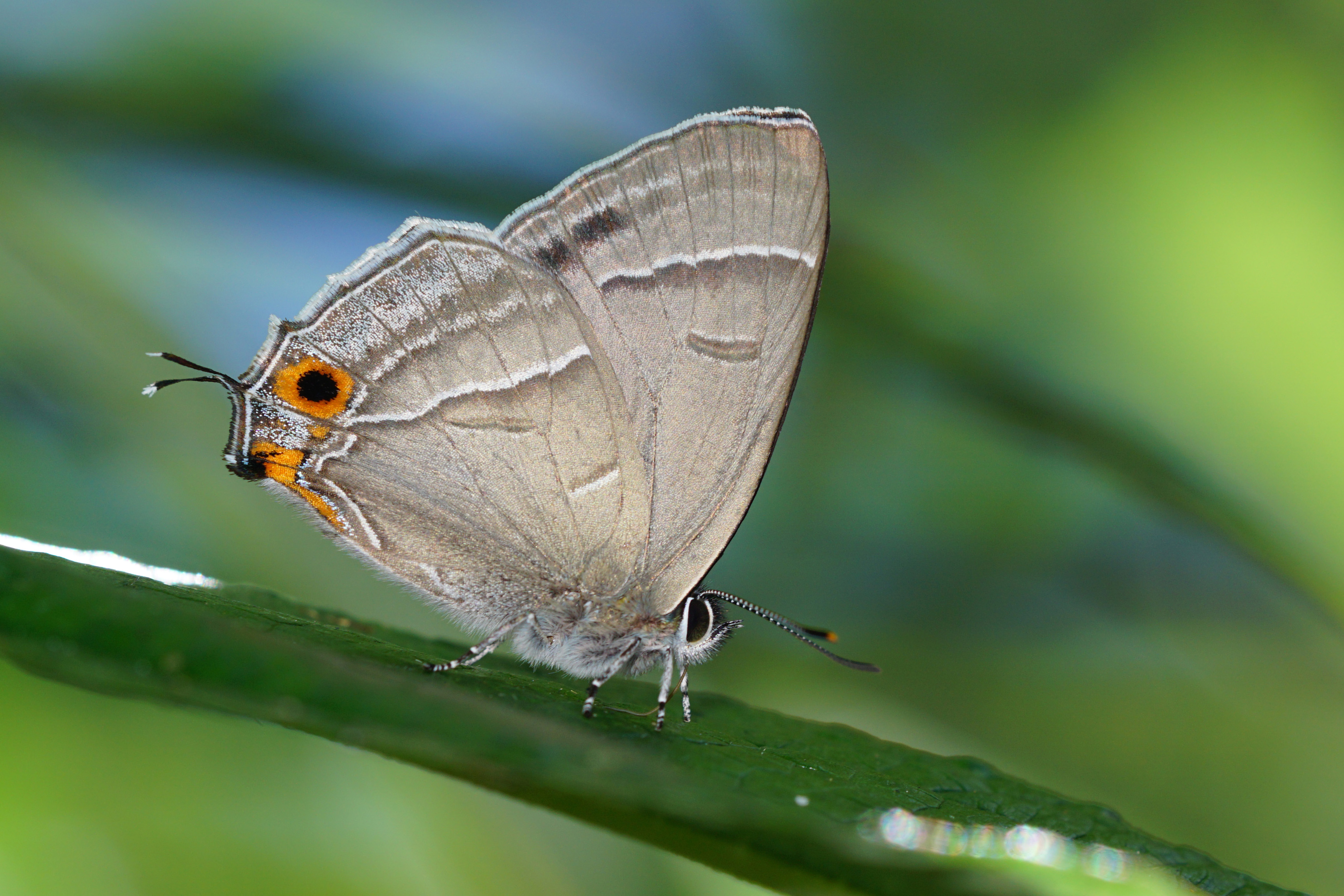 Chrysozephyrus esakii male